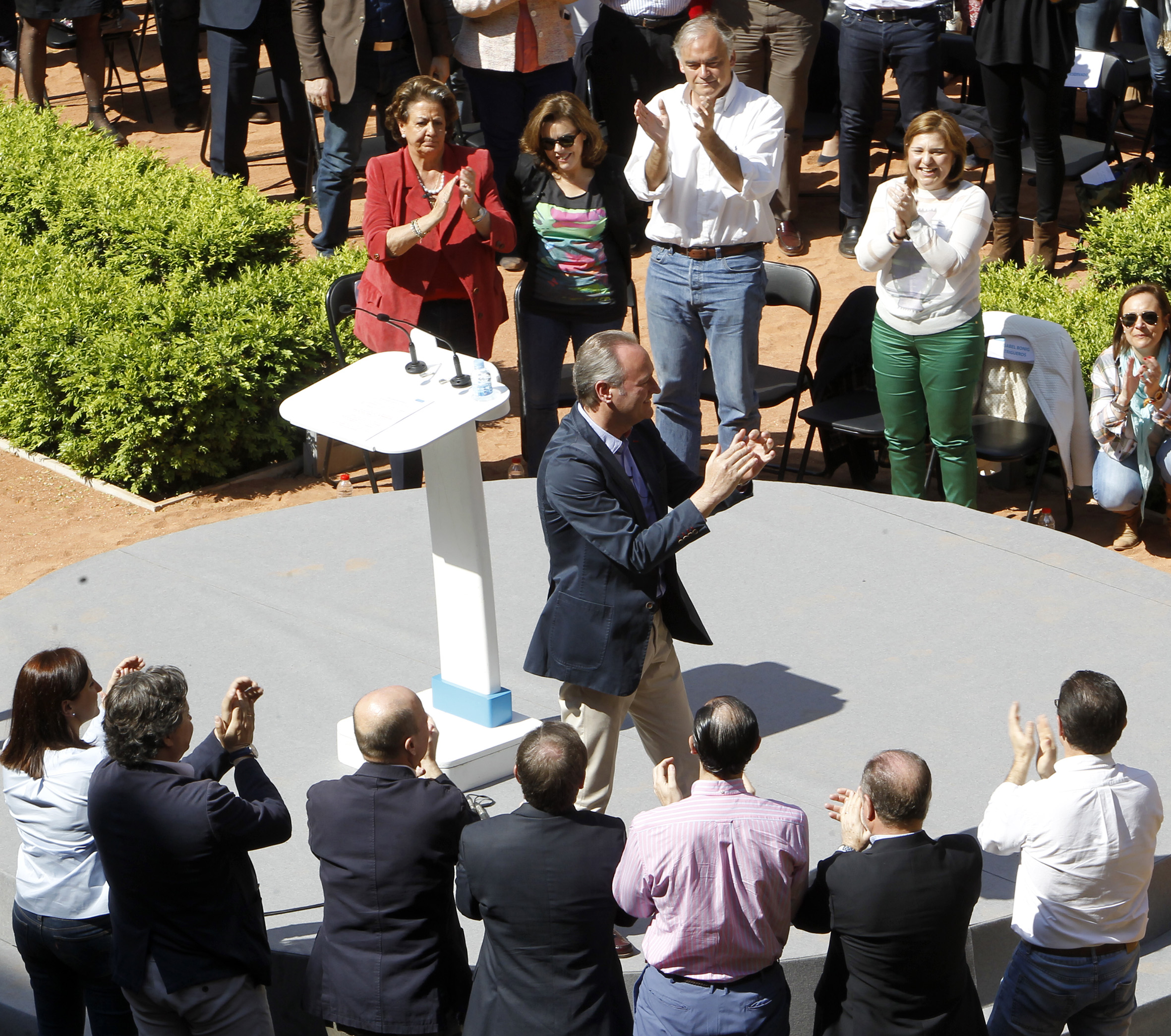 Acto de presentación de la candidatura de Alberto Fabra a la Generalitat Valenciana para las elecciones autonómicas y municipales